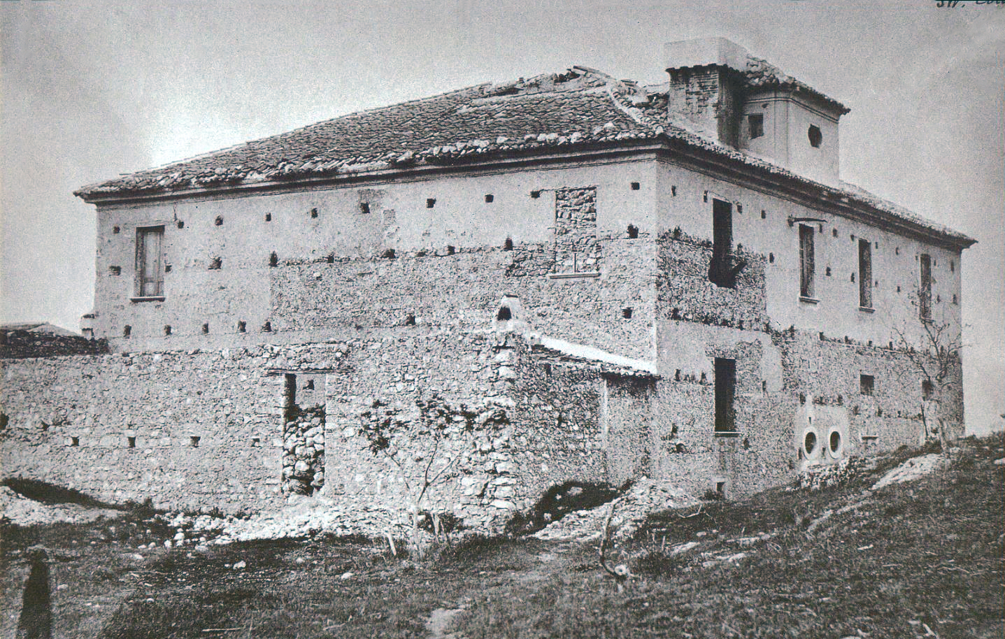 Terremoto 1857 - Padula - Palazzo Romano. (Coda Color Archivi Fotografici)